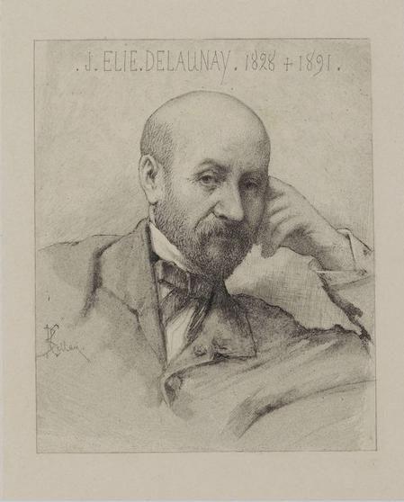 Gravure au burin représentant Jules-Élie Delaunay (1828-1891) et signée C[harles] Bellay.